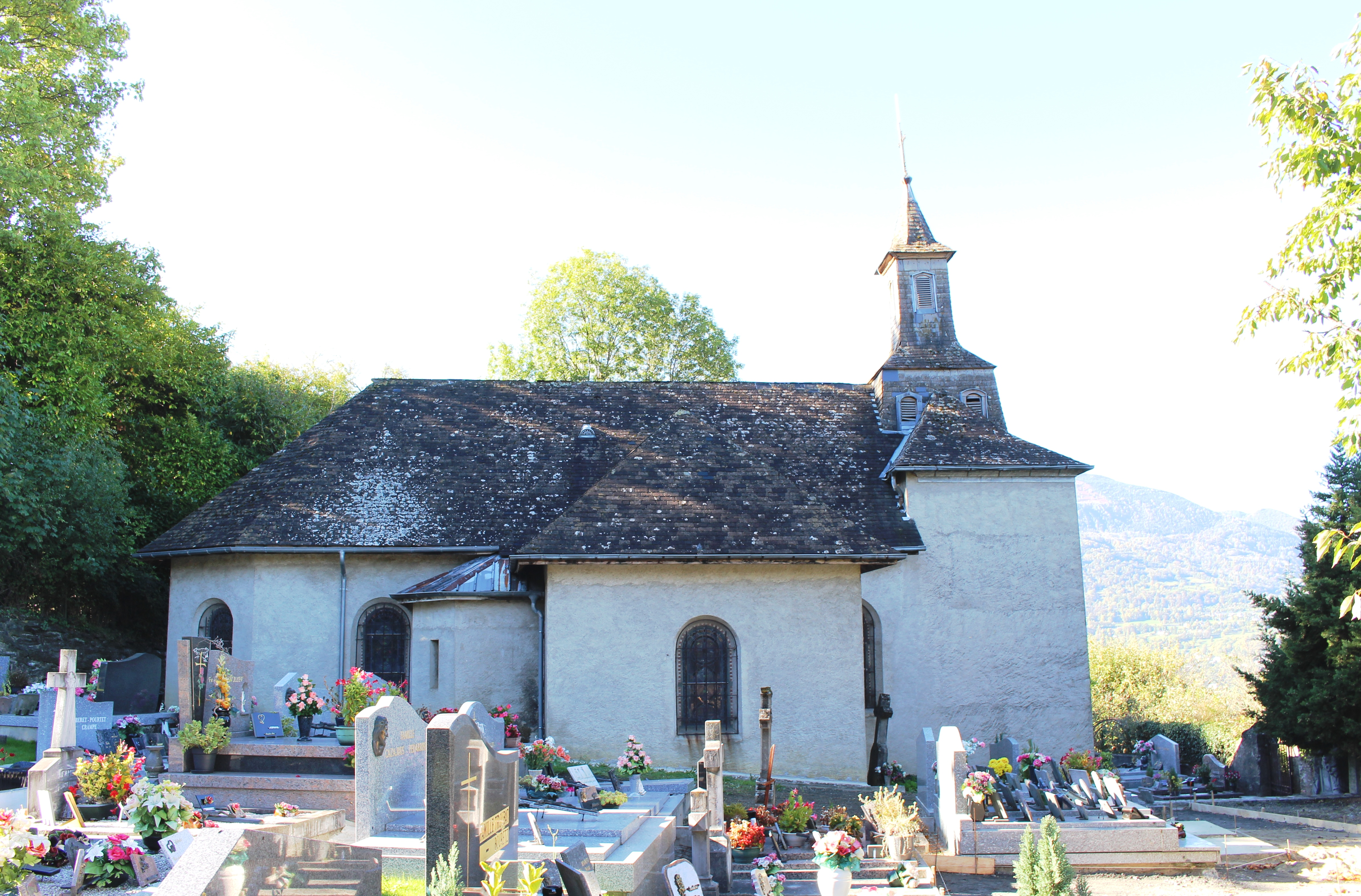 Église Saint-Germé d'Ayros (Hautes-Pyrénées)